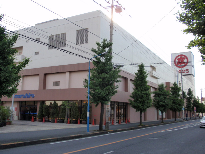 丸広百貨店坂戸店